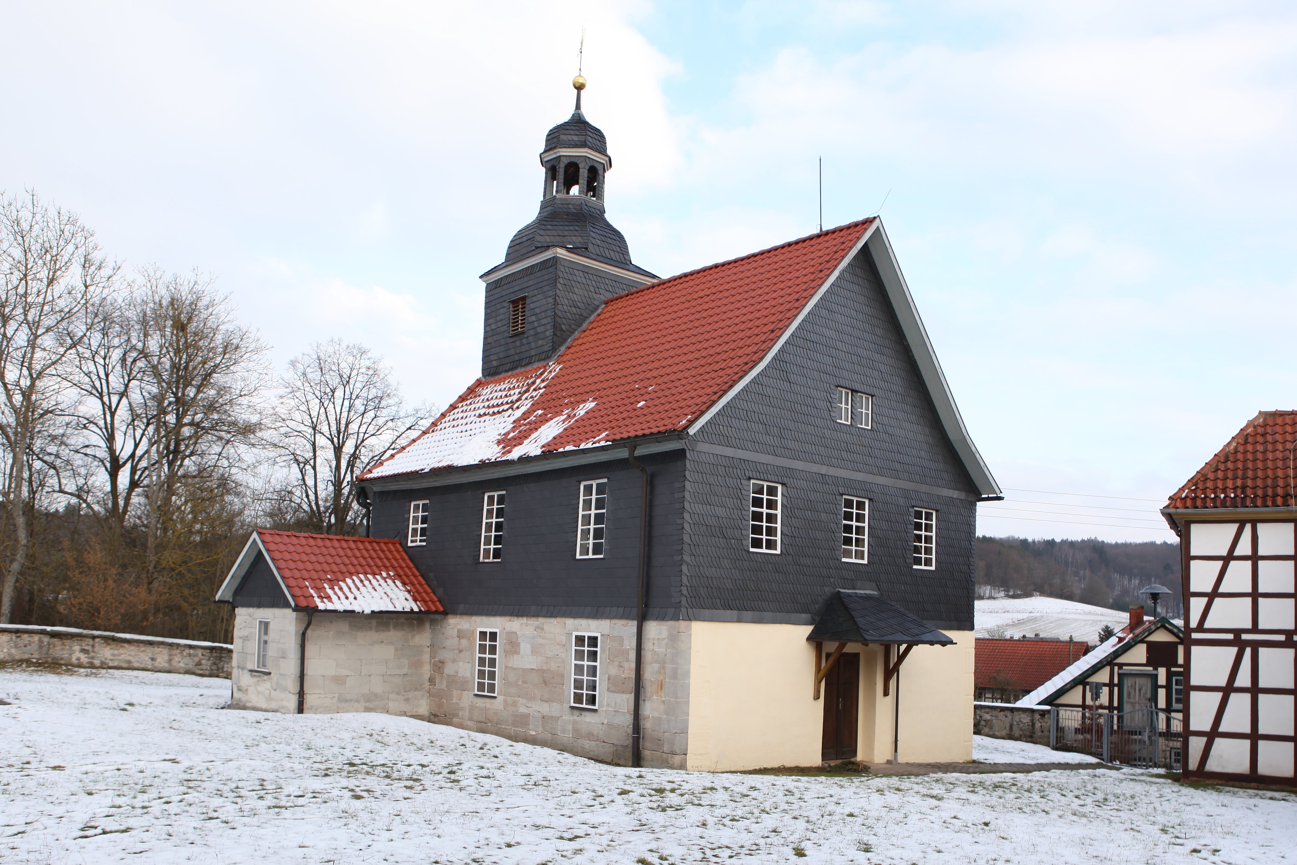 Ev. Kirche St. Wolfgang und St. Jakobus in Holzhausen, OT von Bad Colberg-Heldburg, Landkreis Hildburghausen